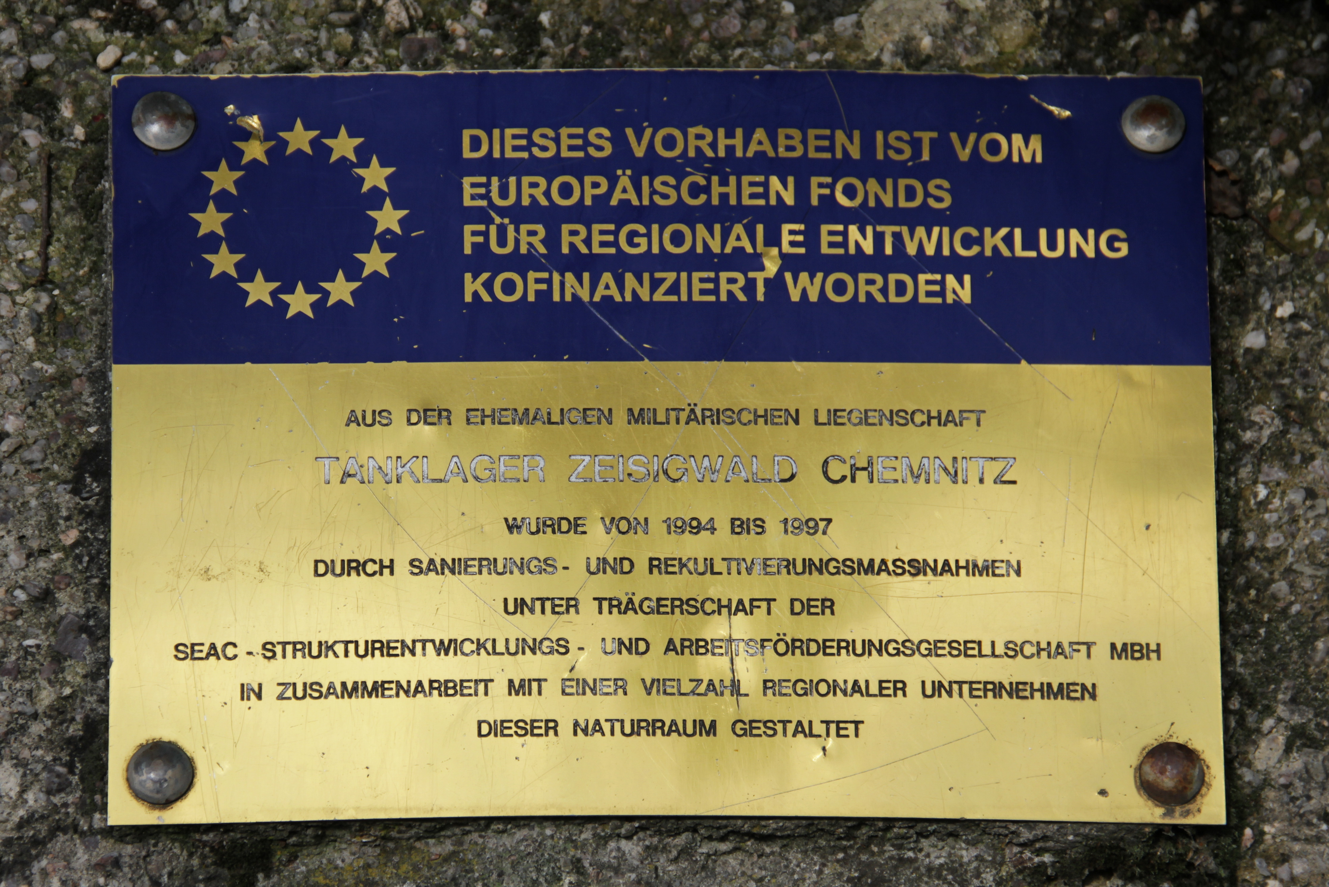 Im Zeisigwald in Chemnitz, FND Quellgebiet im südlichen Zeisigwald